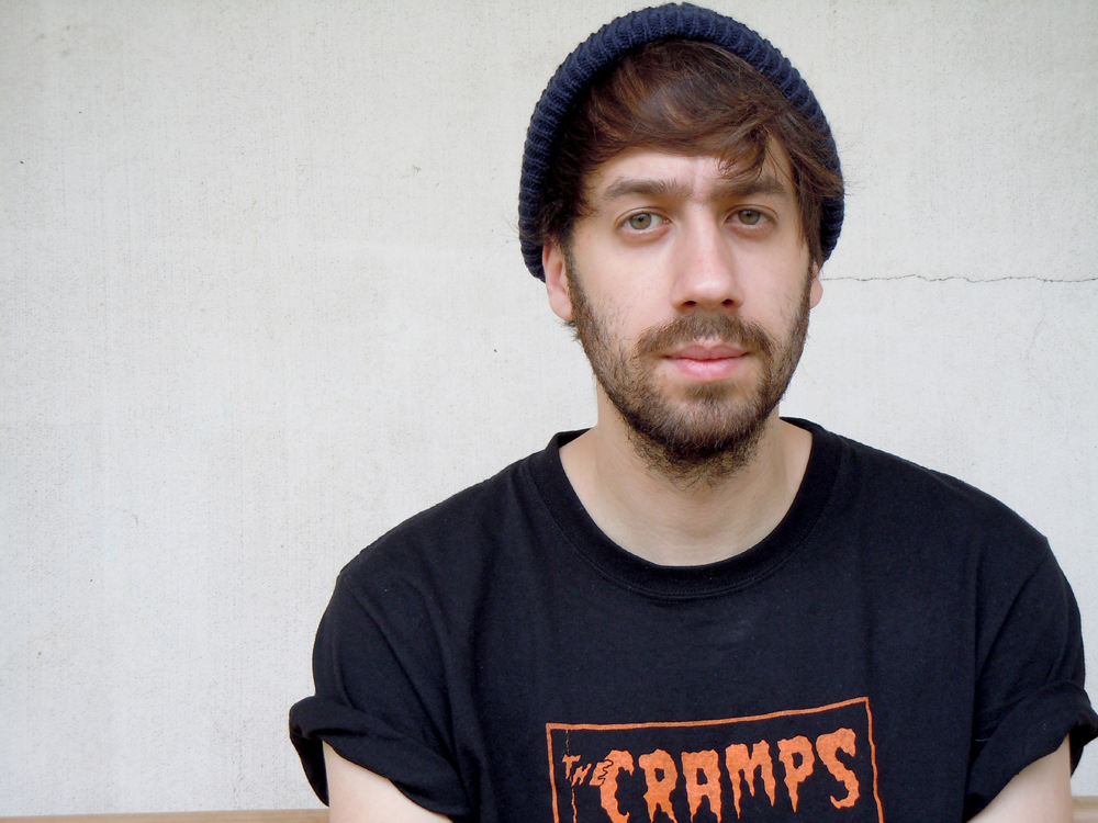 Gold Panda Oct.7.2010 Shinjuku